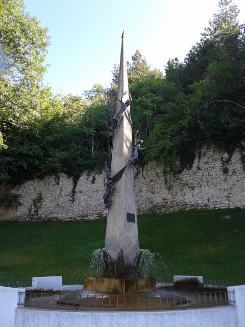 Monumento ai Santi Martiri Simplicio, Costanzo e Vittoriano